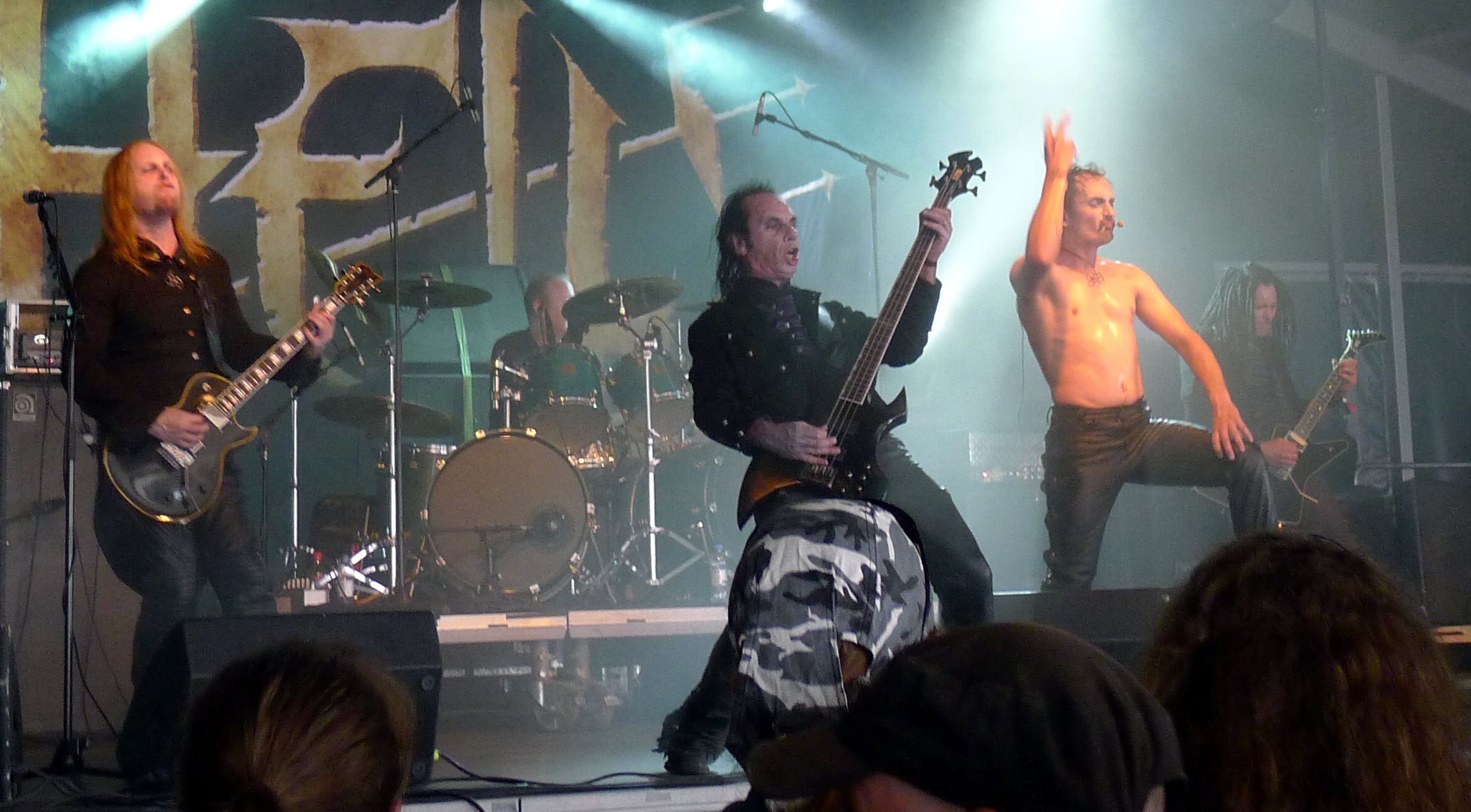 Hell live am Tuska Open Air 2011